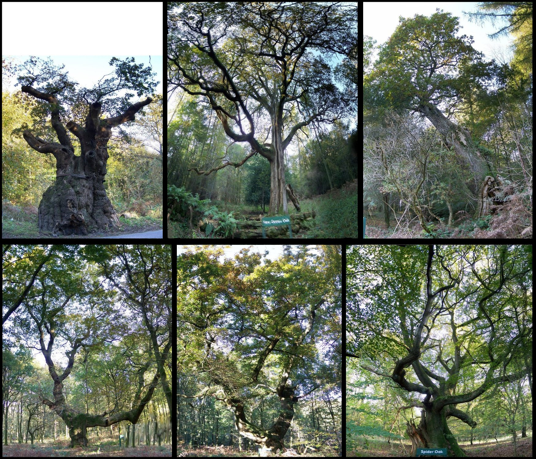 Oak trees of Savernake Forest. Top row. *Big Bellied Oak *New Queen Oak *Queen Oak Bottom row. *Saddle Oak 1 *Saddle Oak 2 *Spider Oak